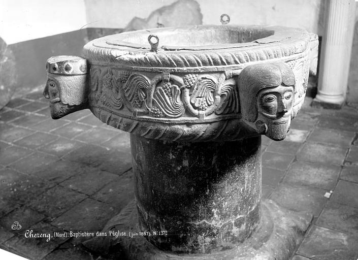 Baptistère.